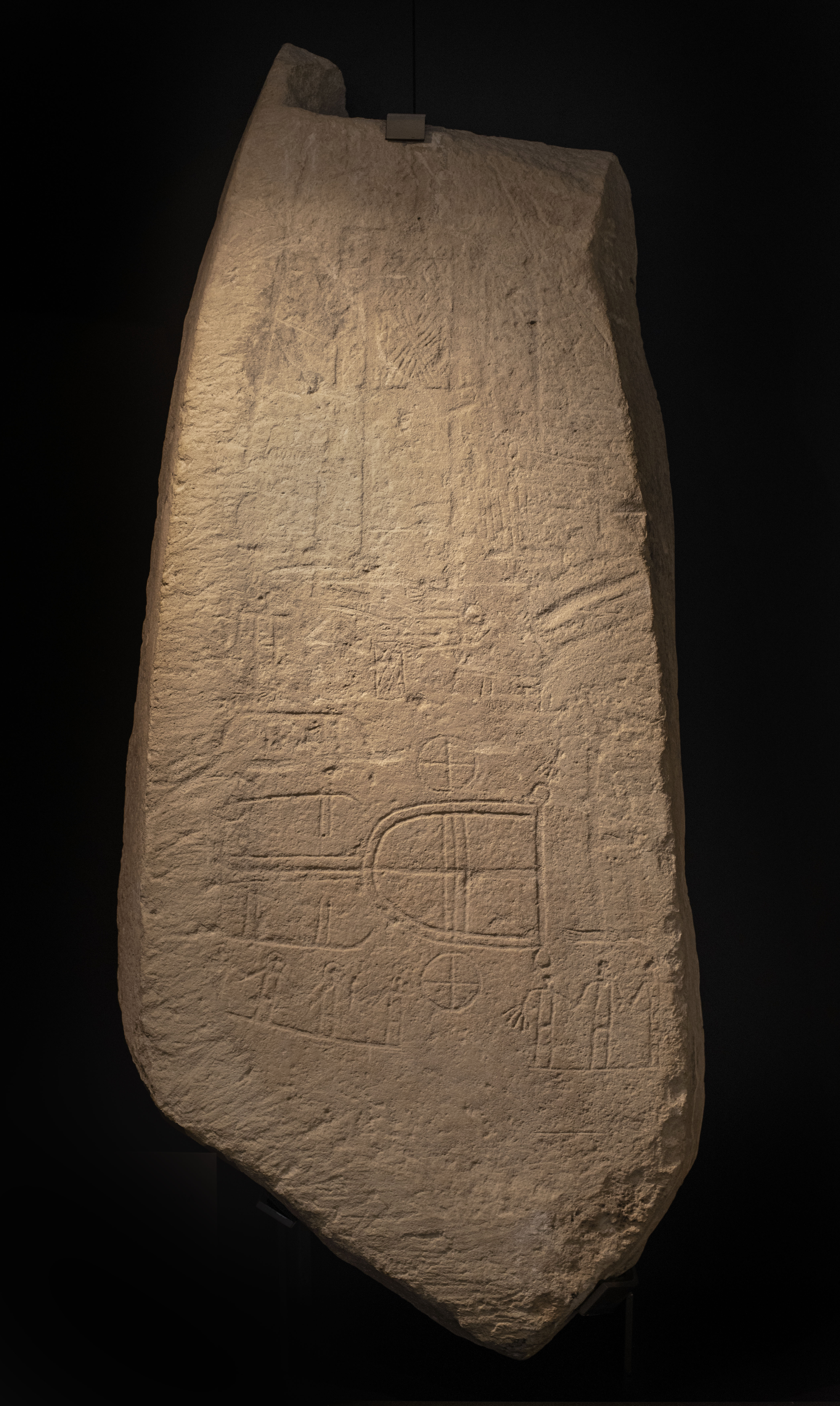 Estela funeraria de la Edad del Bronce, elaborada en caliza y de 1.6 m de altura. Se encontró en 1968 en el yacimiento de Ategua, Córdoba. Ficha en